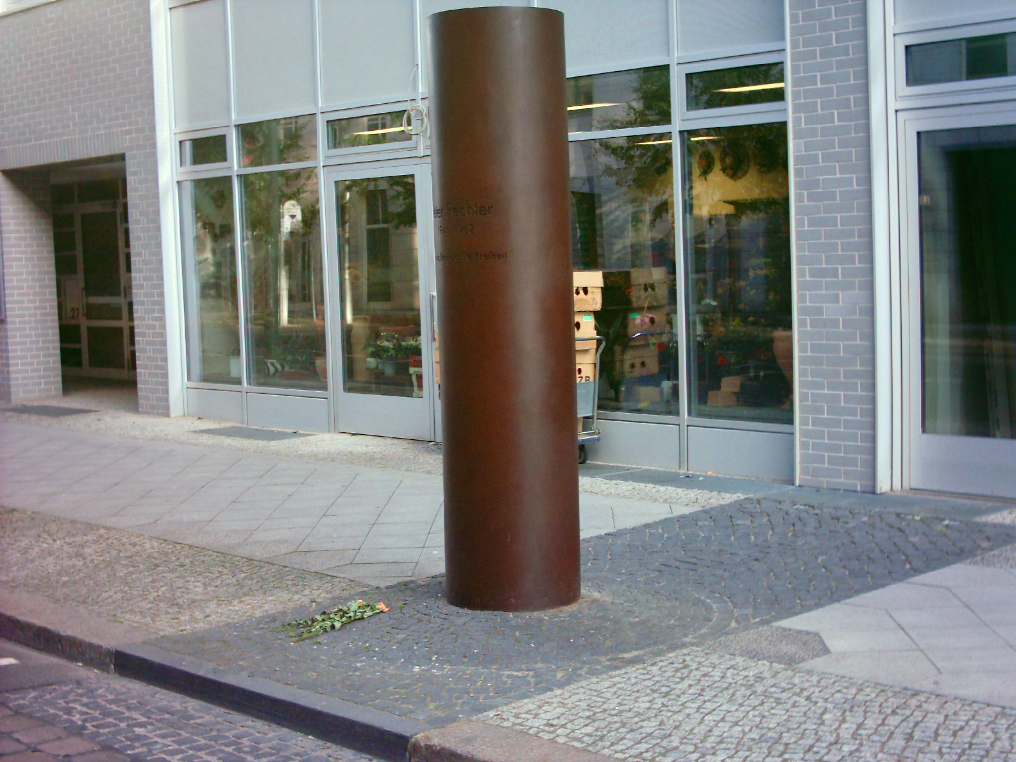 Fechter Mahnmal Gesamtansicht in der Nähe des Checkpoint Charlie vom 19.06.2005 Fotograf: Jens Lordan Dateistatus: GNU FDL